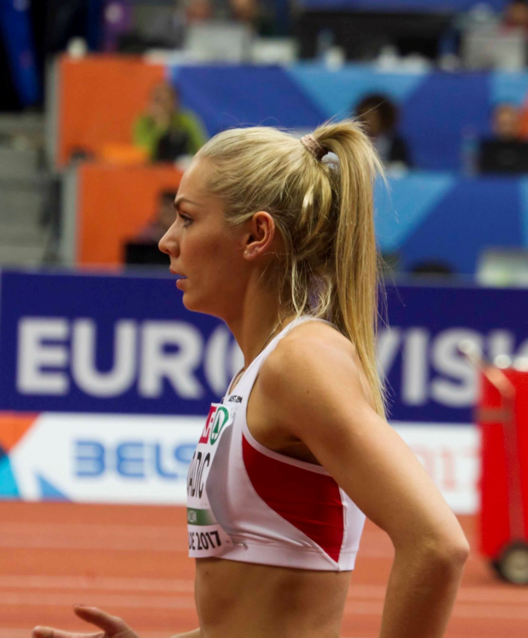 _164 pent dadic